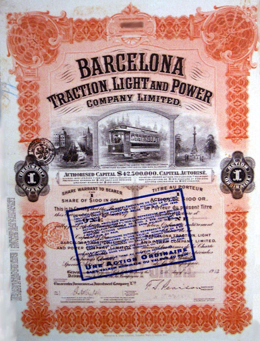 Acció de la Companyia Barcelona Traction, Light and Power Limited